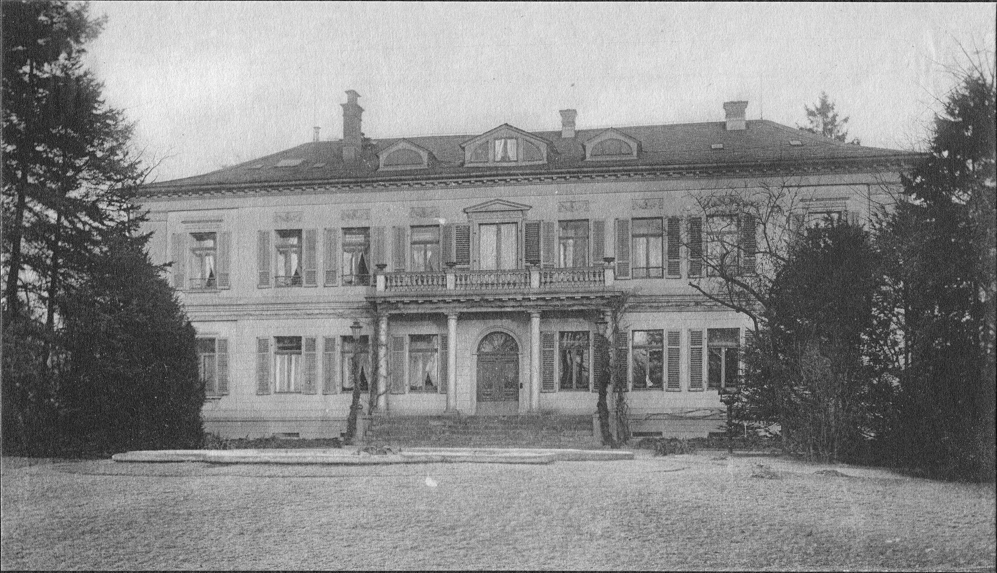 Offenbach, Frankfurter- Ecke Tulpenhofstraße, Haus Loewenruhe. Klassizistischer Bau in einem großen Park. Erbaut als Ruhesitz des Generalleutnant Freiherr Siegmund Löw von und zu Steinfurt (1757, Staden - 1846, Offenbach), General in englischen bzw. königlich hannoverischen Diensten. Später häufiger Besitzwechsel der Villa Löwenruhe u.a. durch Tabakfabrikant Adolf Krafft mit seiner malenden Ehefrau, die unter ihrem Pseudonym Ralf Semin bekannt wurde. Heute hat sich nur noch das ehemalige Gärtnerhaus nahe dem Deutschen Wetterdienst erhalten.